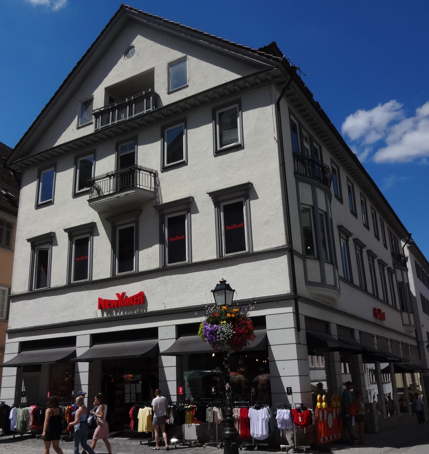 Haus Ecke Holzmarkr Neue Strasse Aufnahme 2020-06-25